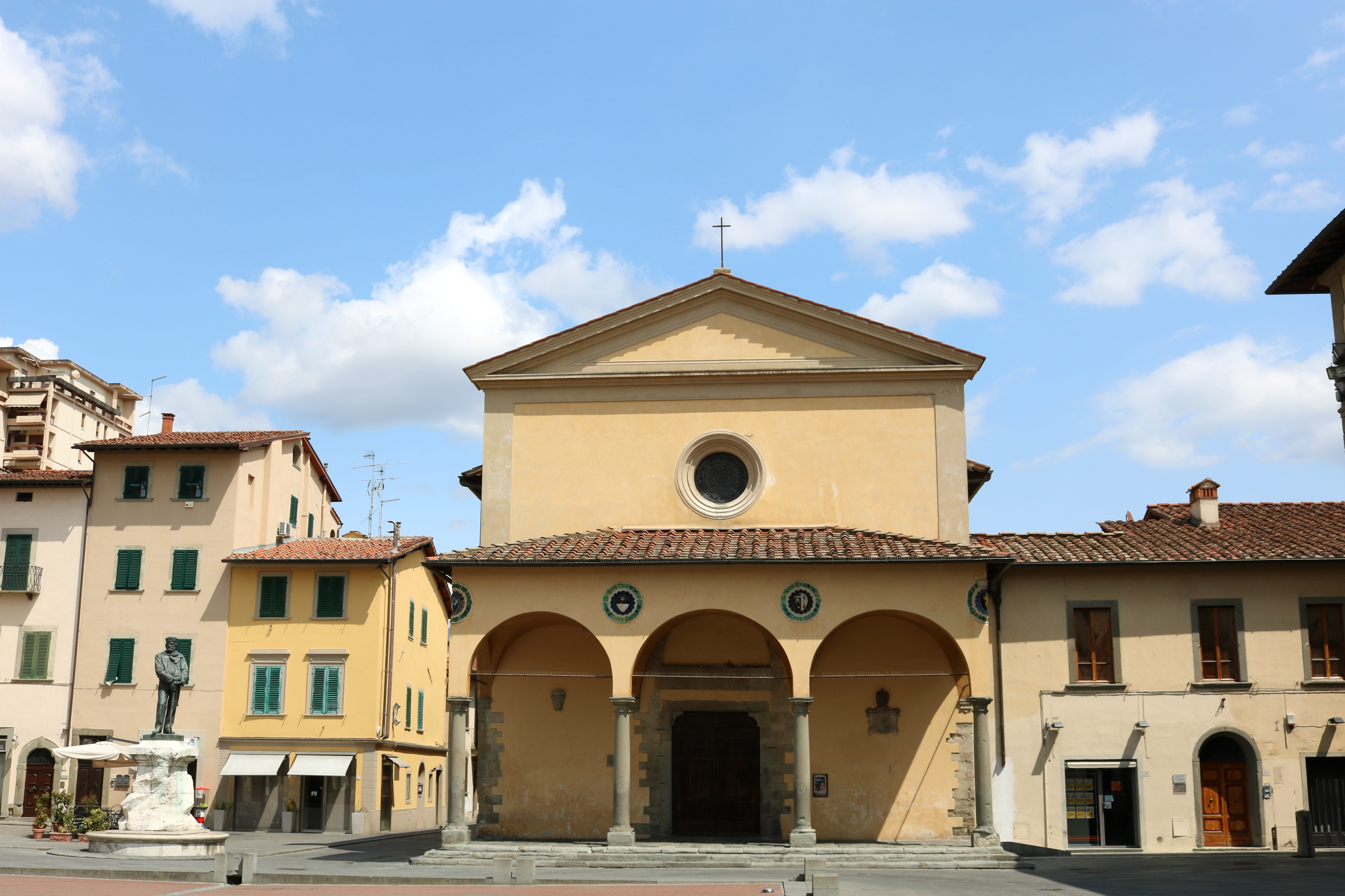 Centro Storico di San Giovanni Valdarno This is a photo of a monument which is part of cultural heritage of Italy.